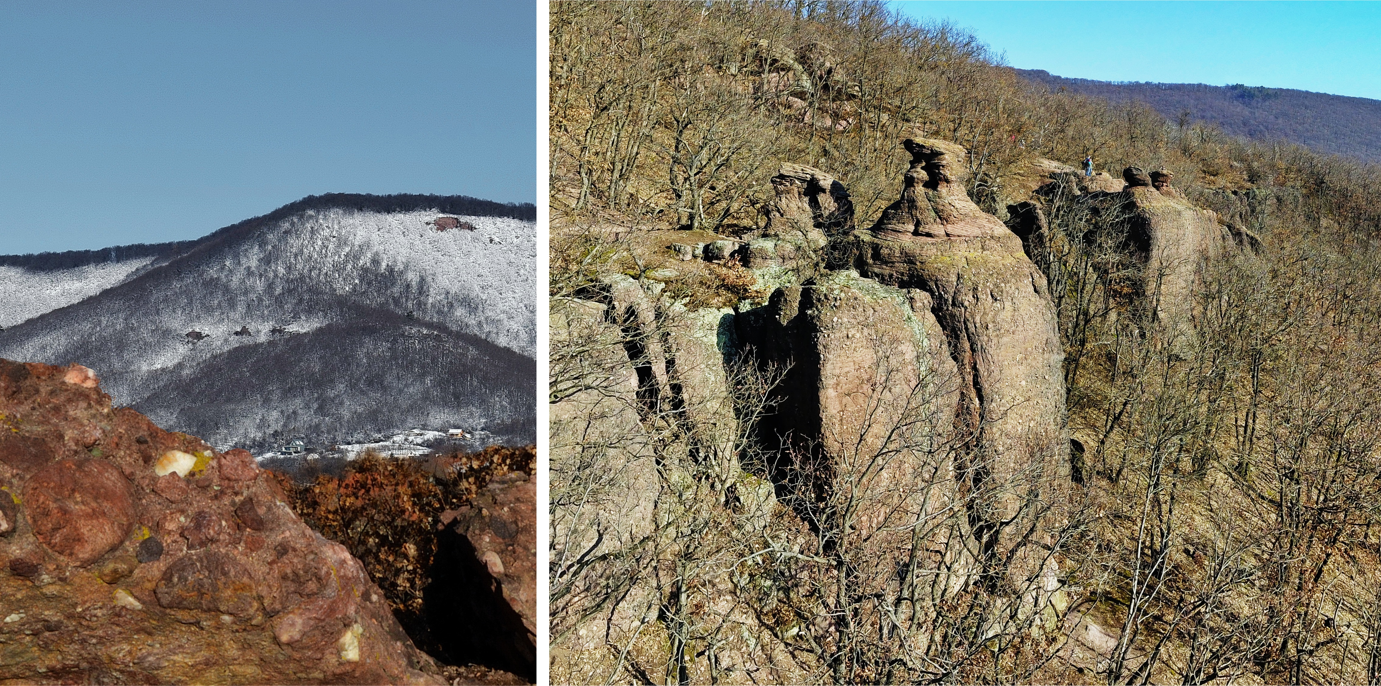 A Jakabhegyi Homokkő kovás kötőanyagú, kemény konglomerátuma kipreparálódott a Cserkút közeli dombtetőkön és a Jakab-hegy oldalában. Utóbbi sziklaformák Babás-szerkövek néven ismertek.